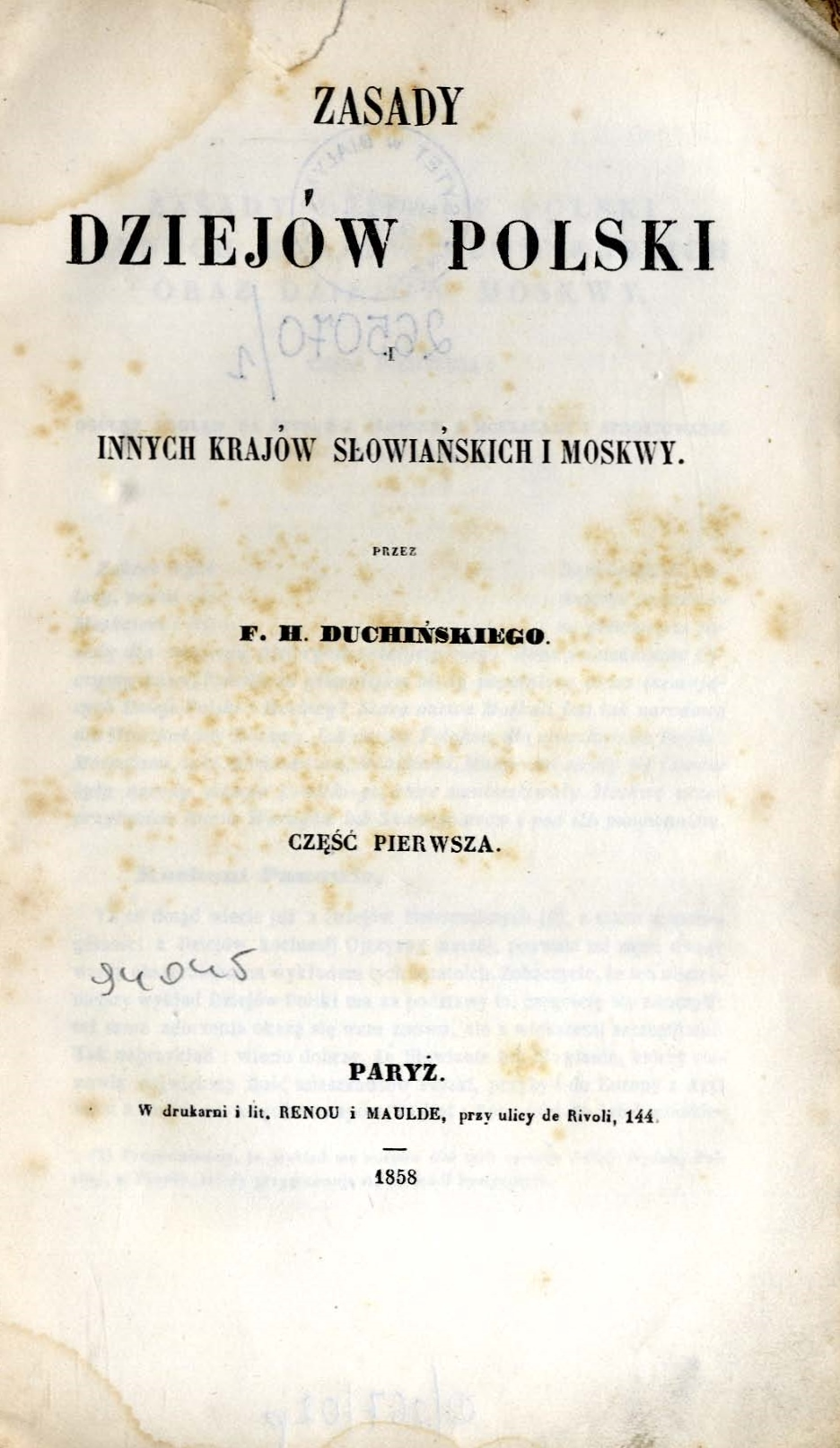 «Основы истории Польши, других славянских стран и Москвы» (1858—1860), Францишек Духиньский (ум. 1893).